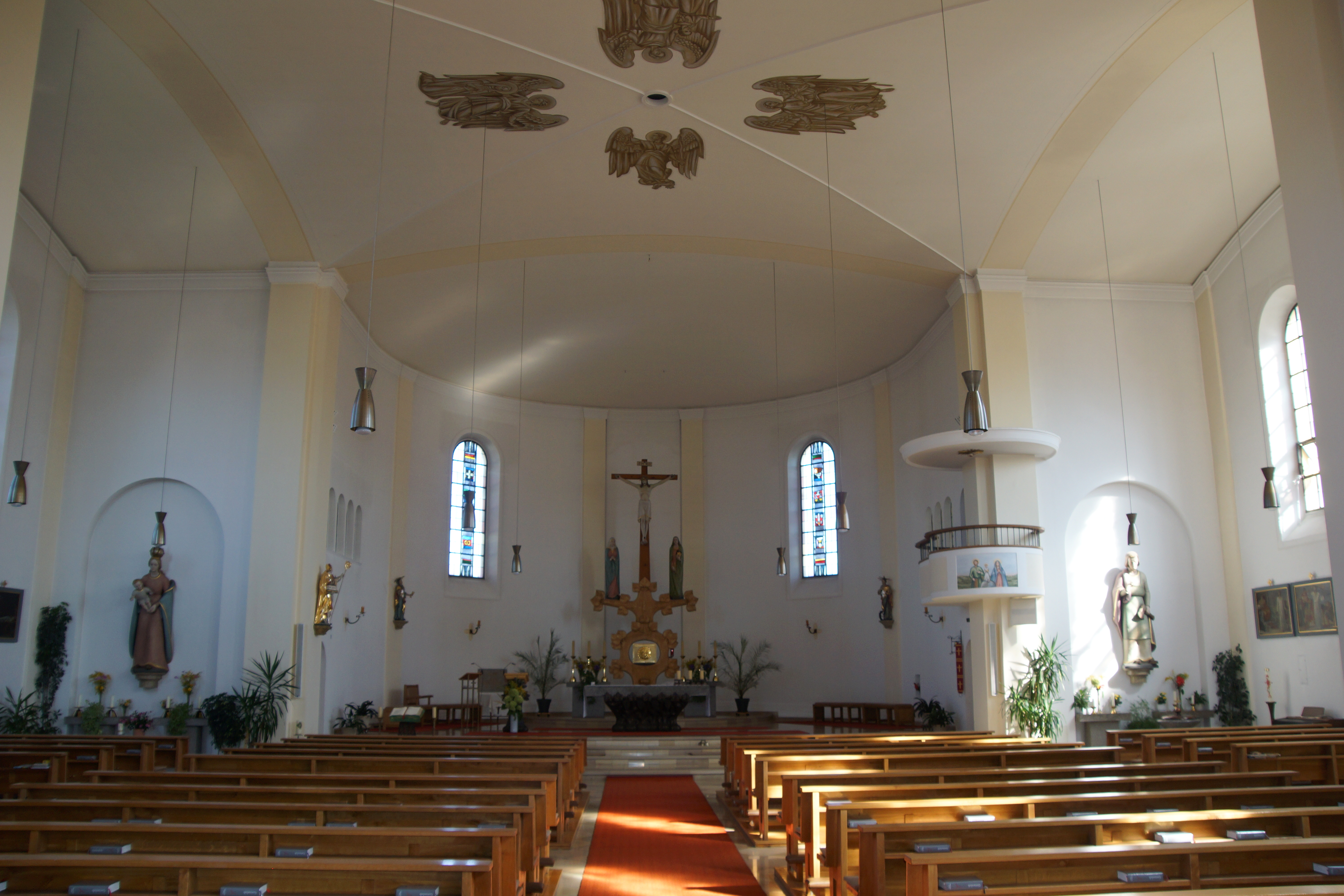 Heilige Familie - Weiherhammer